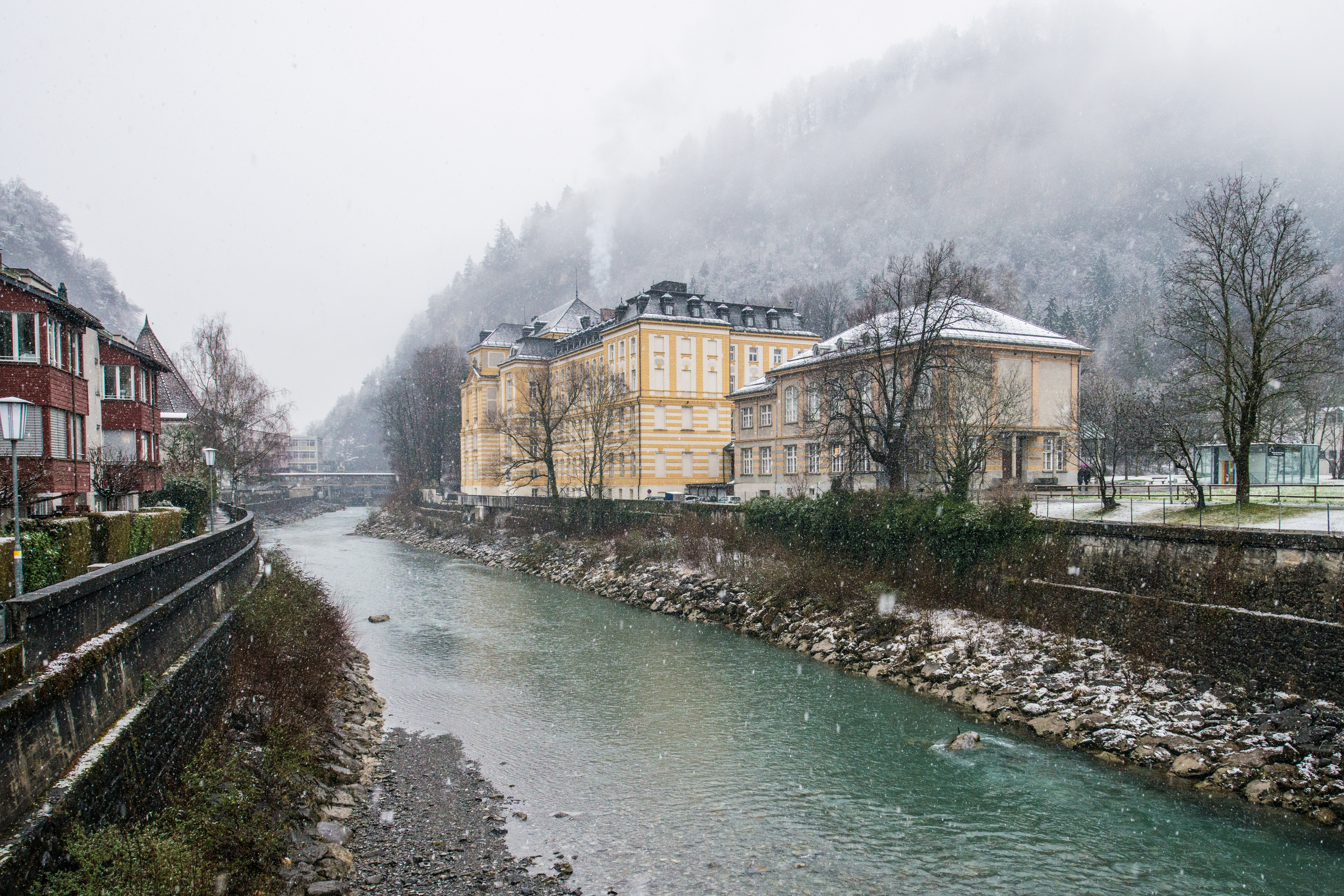 Rechts von der Ill steht das Stella Matutina, heute Landeskonservatorium und wurde 1899 durch Peter Hutter in Feldkirch, Vorarlberg erbaut.